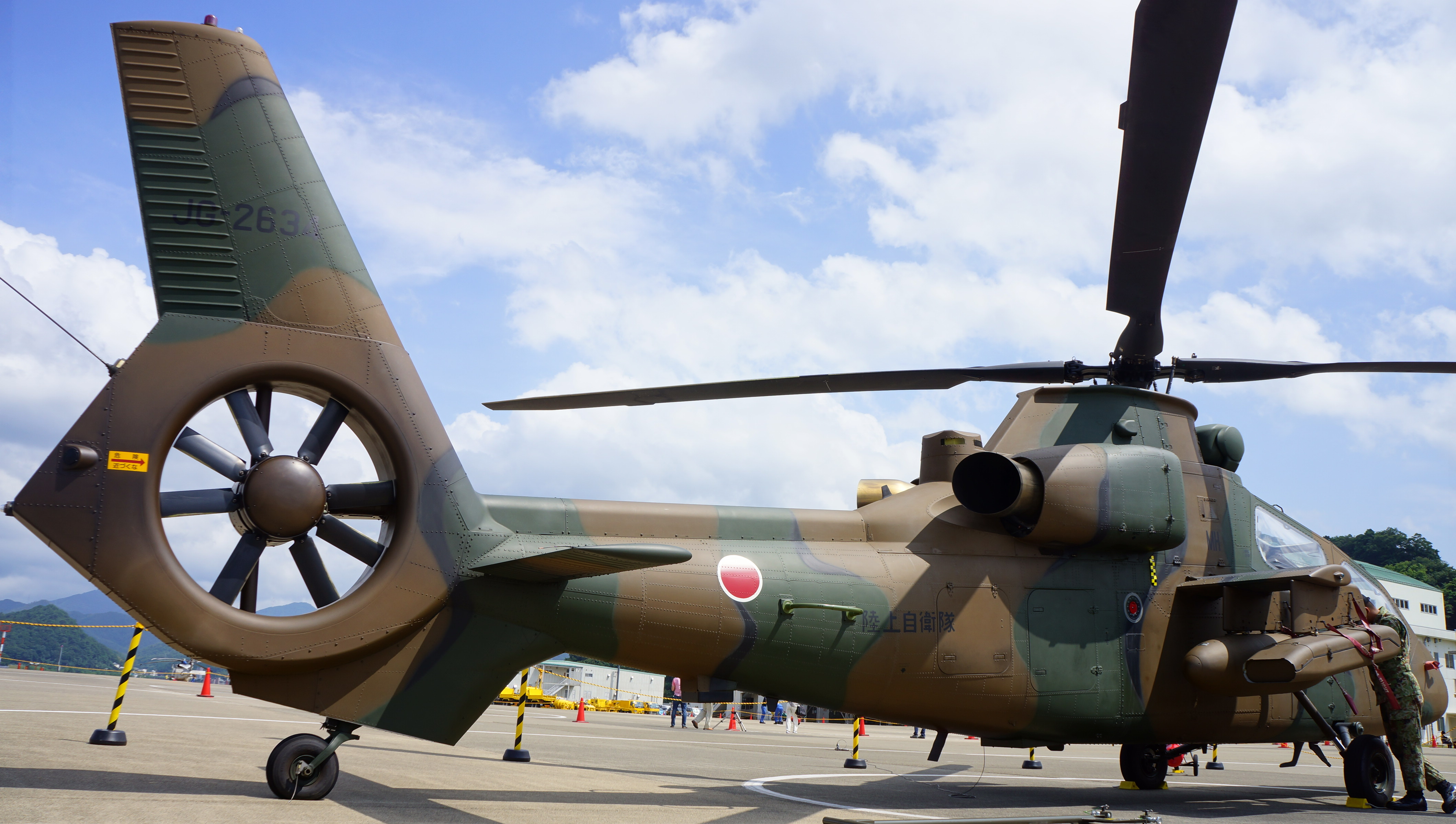 陸上自衛隊 OH-1観測ヘリコプター（32634号機） 右後方。 14年7月27日 海上自衛隊舞鶴航空基地にて。